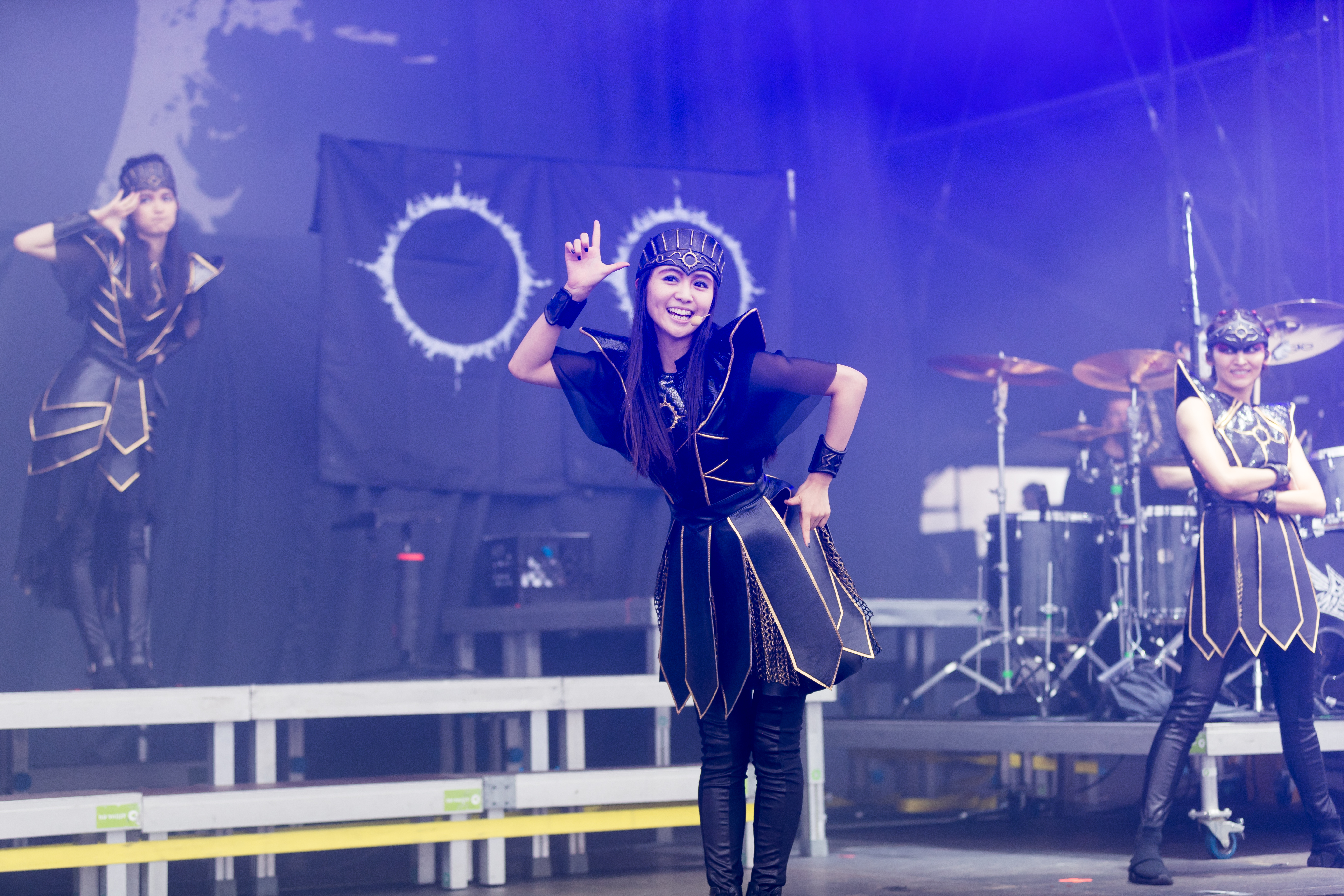 Babymetal @ Rock am Ring 2018